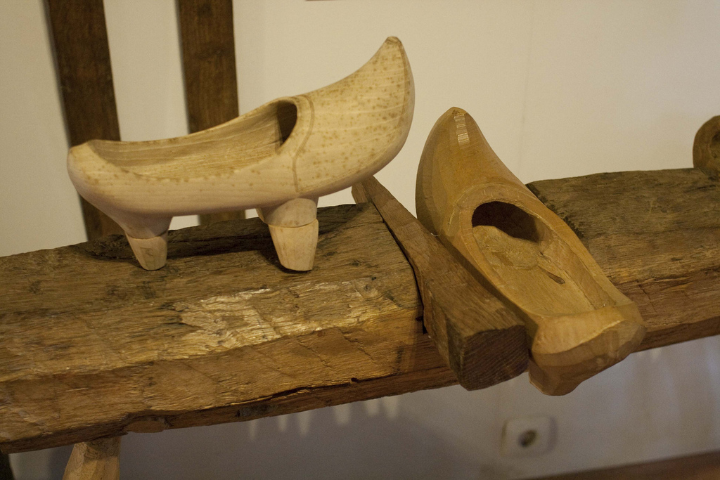 Albarcas